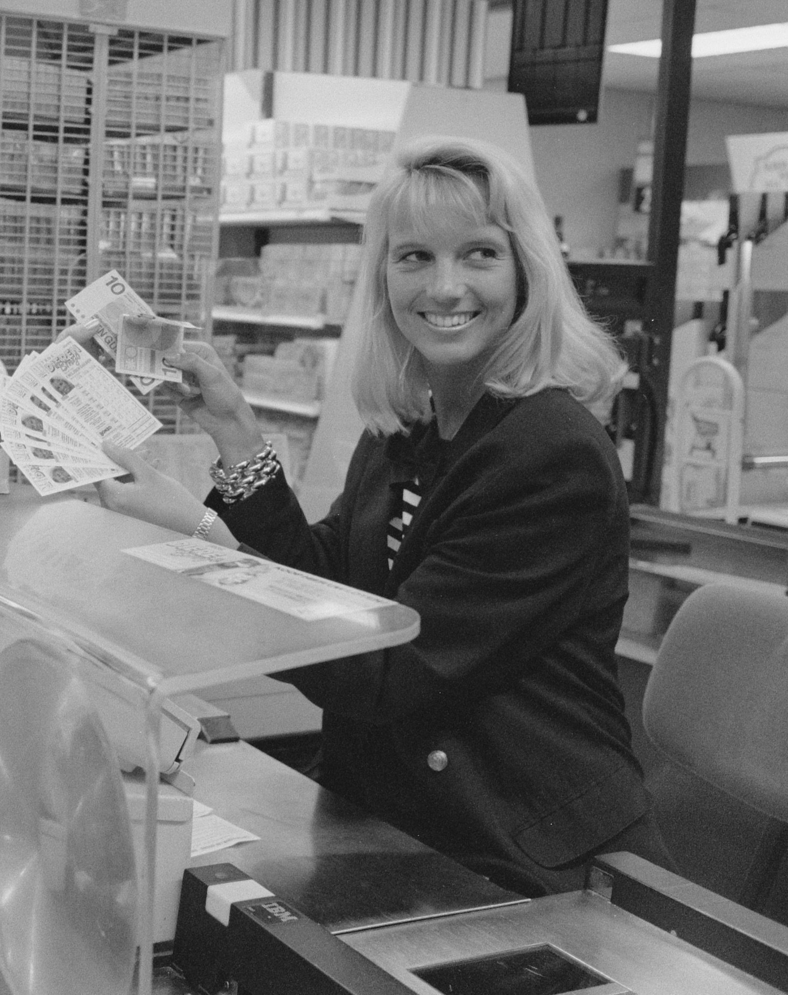 Start Dierenbingo in Bussum ten bate van de dierenbescherming; Linda de Mol met de eerste kaarten